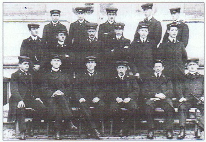 Photographie du domaine public: les Elèves-maîtres de la promotion 1908-1911 de l'Ecole normale de garçons d'Orléans (Loiret)